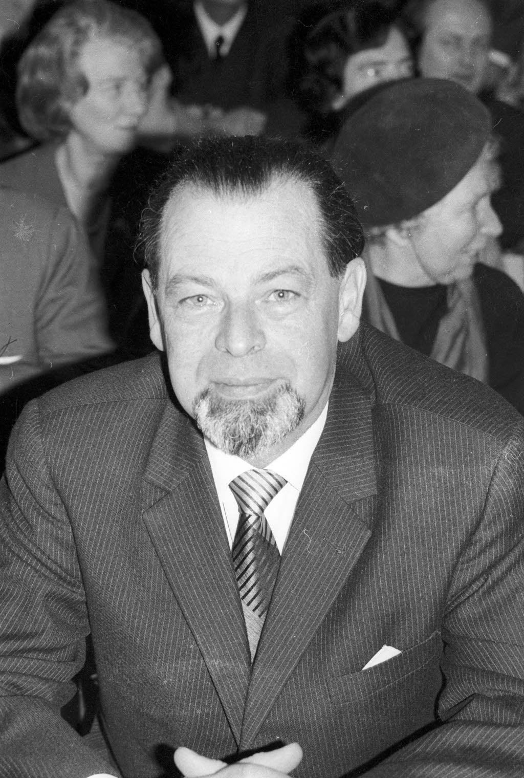 Chefarzt des Städtischen Krankenhauses und Direktor der 2. Medizinischen Universitäts- und Poliklinik der Christian-Albrechts-Universität (CAU) im Städtischen Krankenhaus. Referent der Kieler Universitätstage 1968.